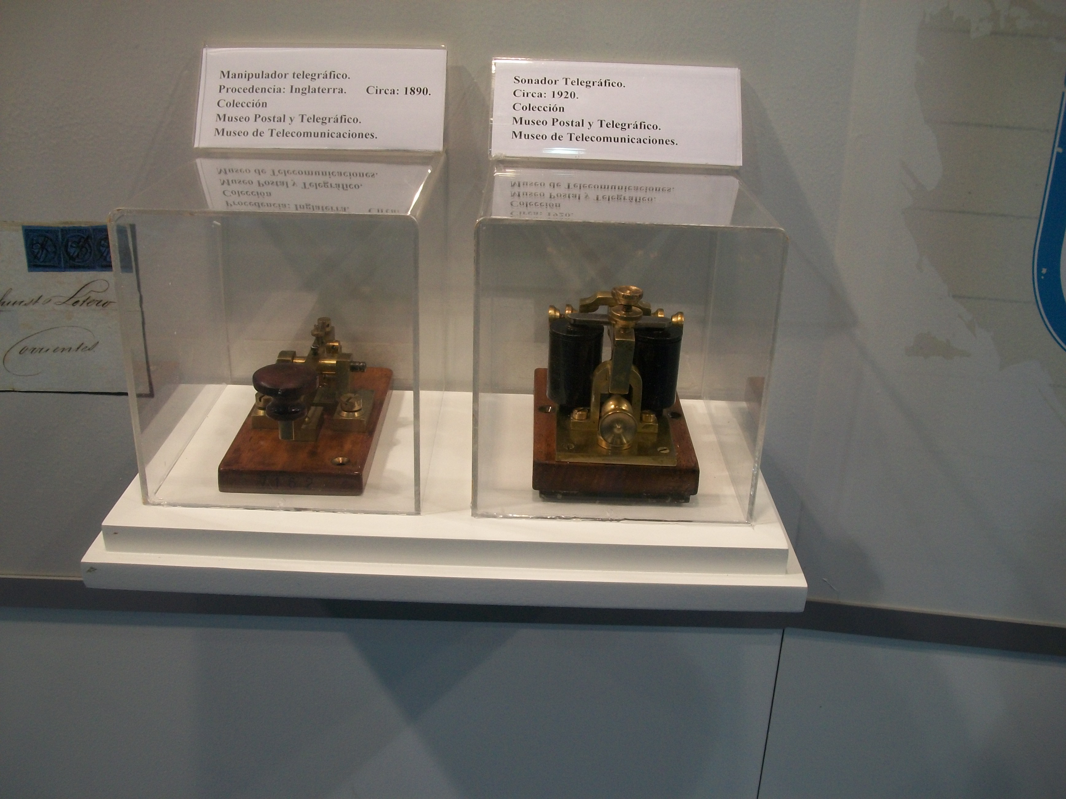 Manipulador y sonador telegráfico usado en el correo de Argentina